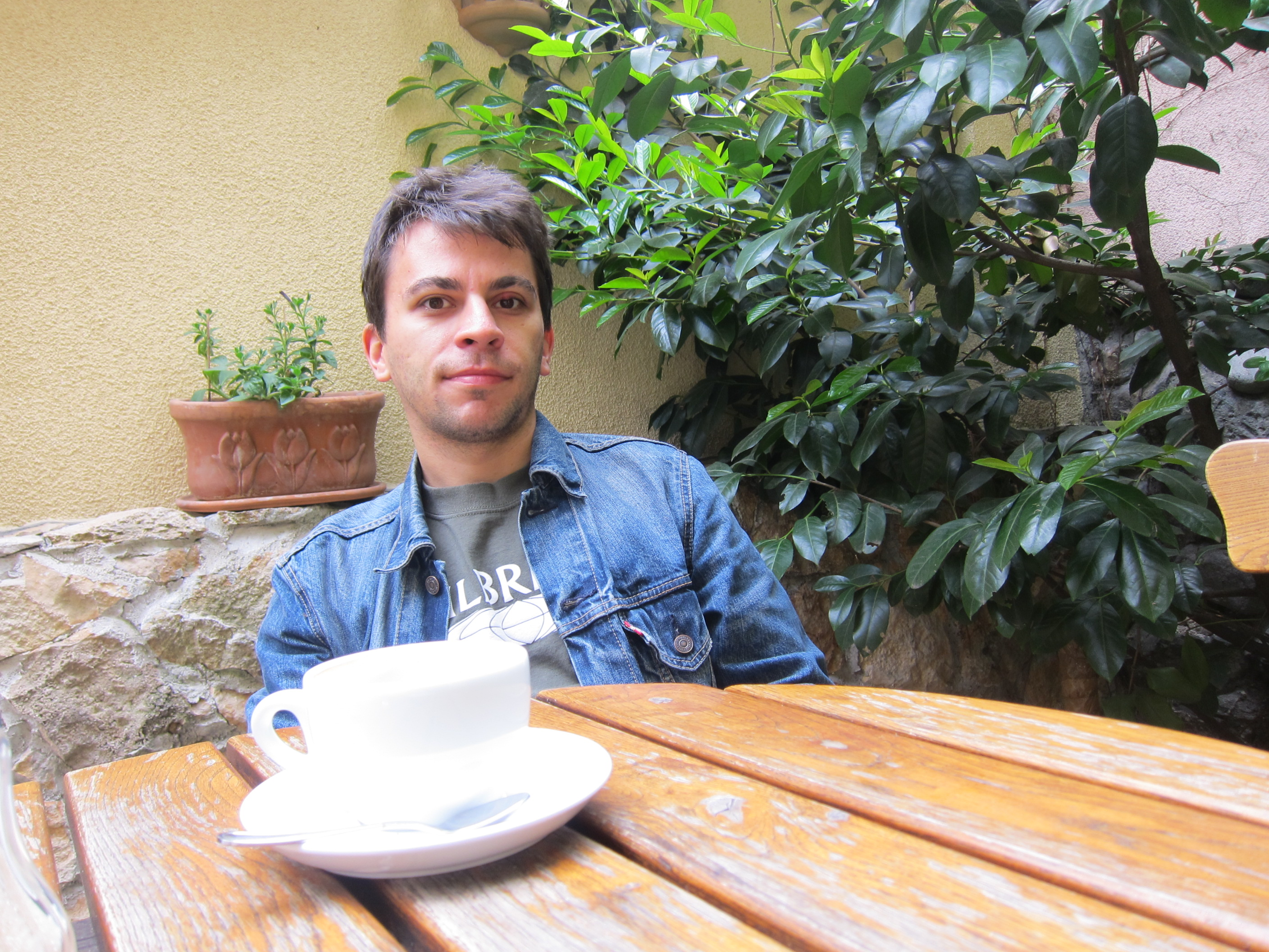 Ангел Игов - писател и преводач